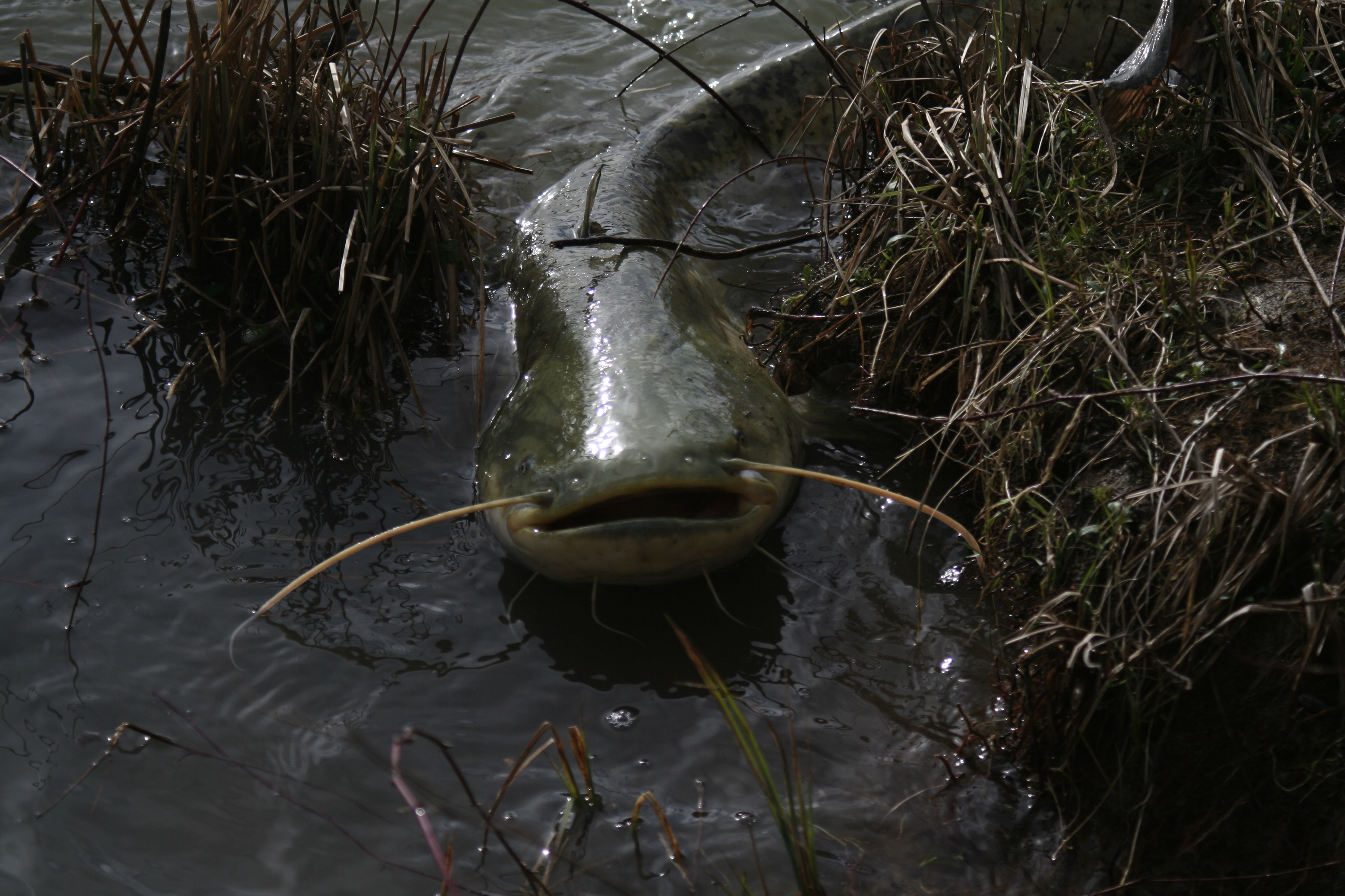 silure